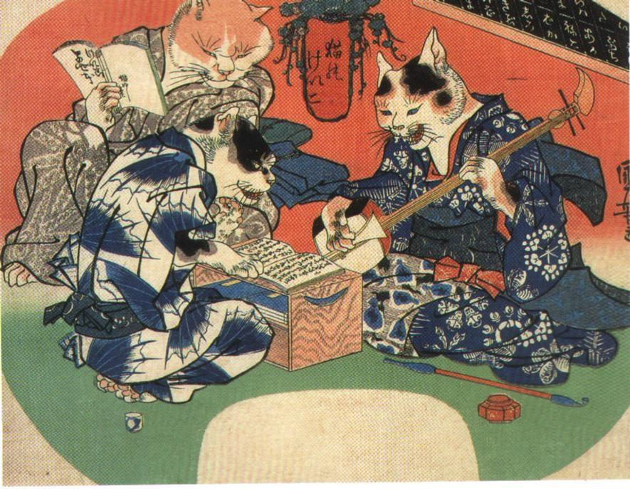 歌川国芳作、猫のけいこ - 天保12（1841）年成立